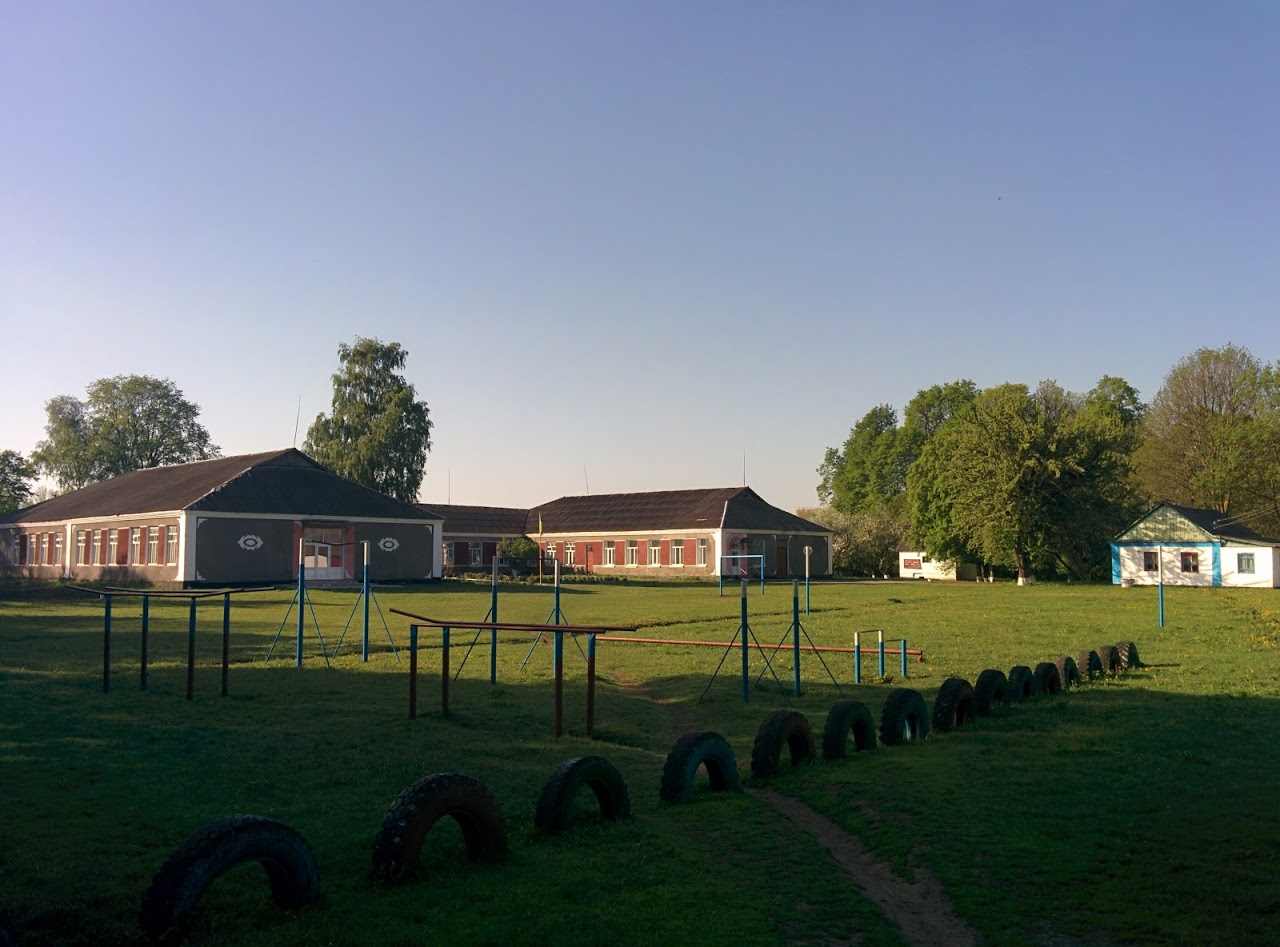 Богданівська ЗОШ І-ІІ ступенів